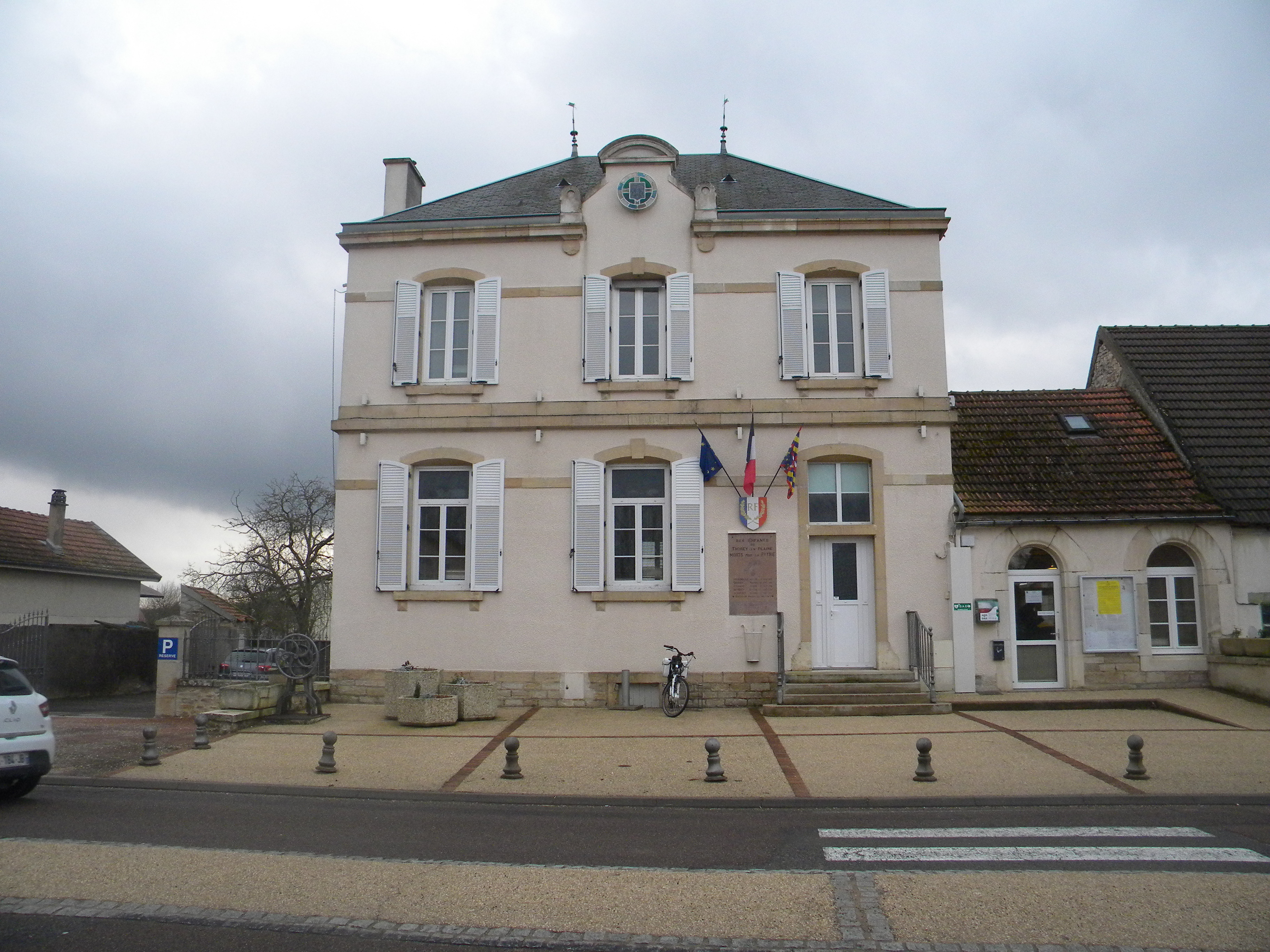 La urbodomo de Thorey-en-plaine.